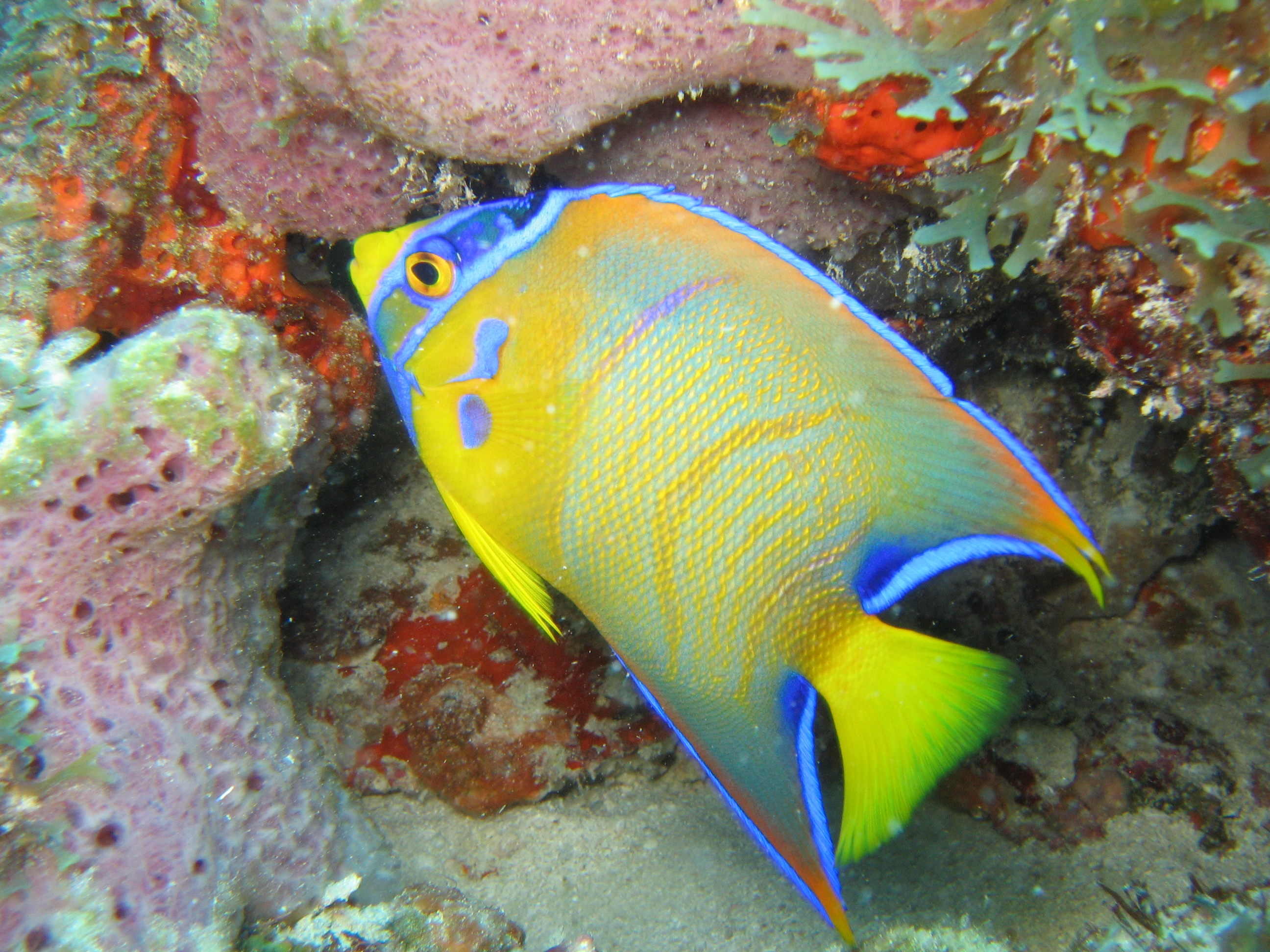 Uma das espécies mais abundantes de peixes recifais encontrados no litoral cearense